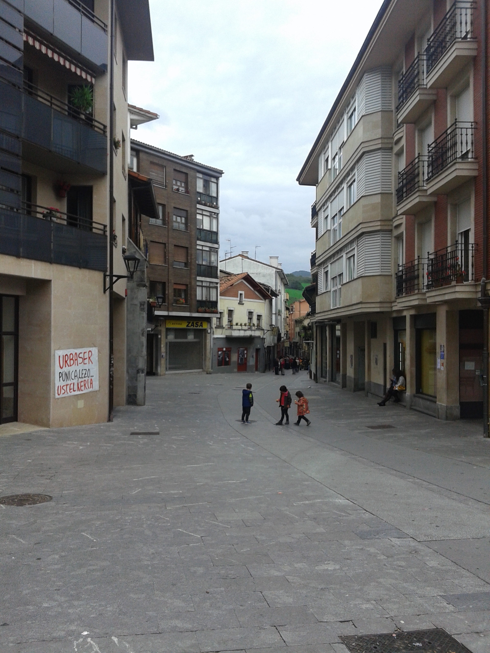 Andoaingo kale nagusia goiko partetik ikusita.